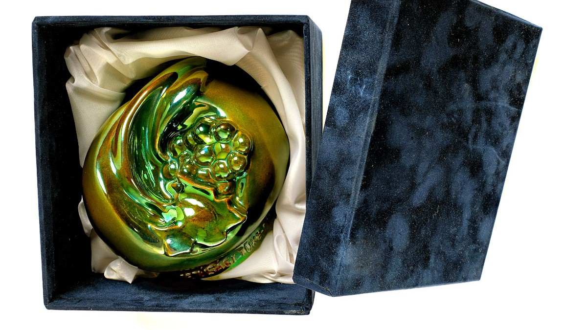 Az Ifjúsági Tüke-díj eozinszobra díszdobozban